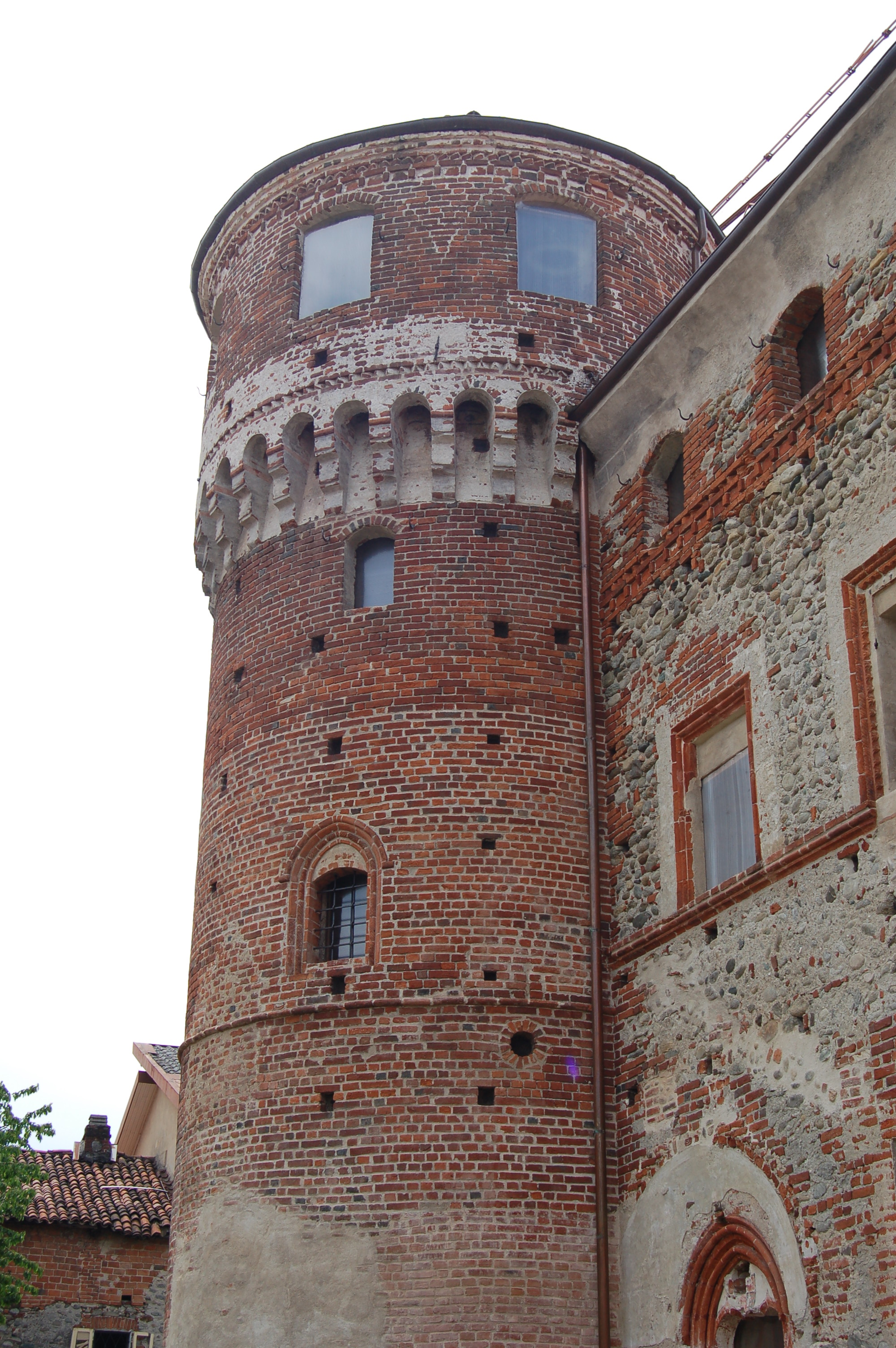 Castello di Ozegna Torre sud